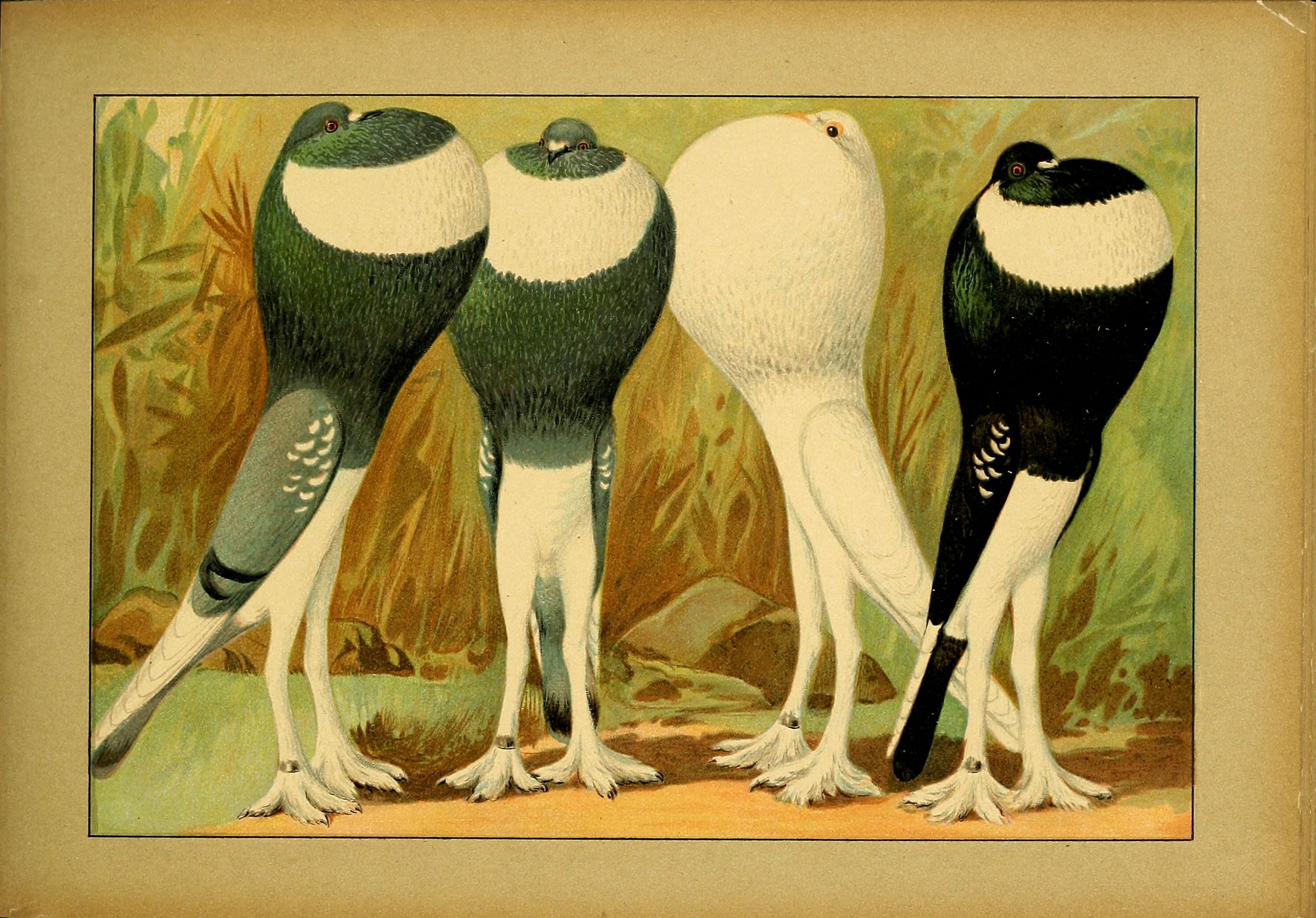 Deutsch